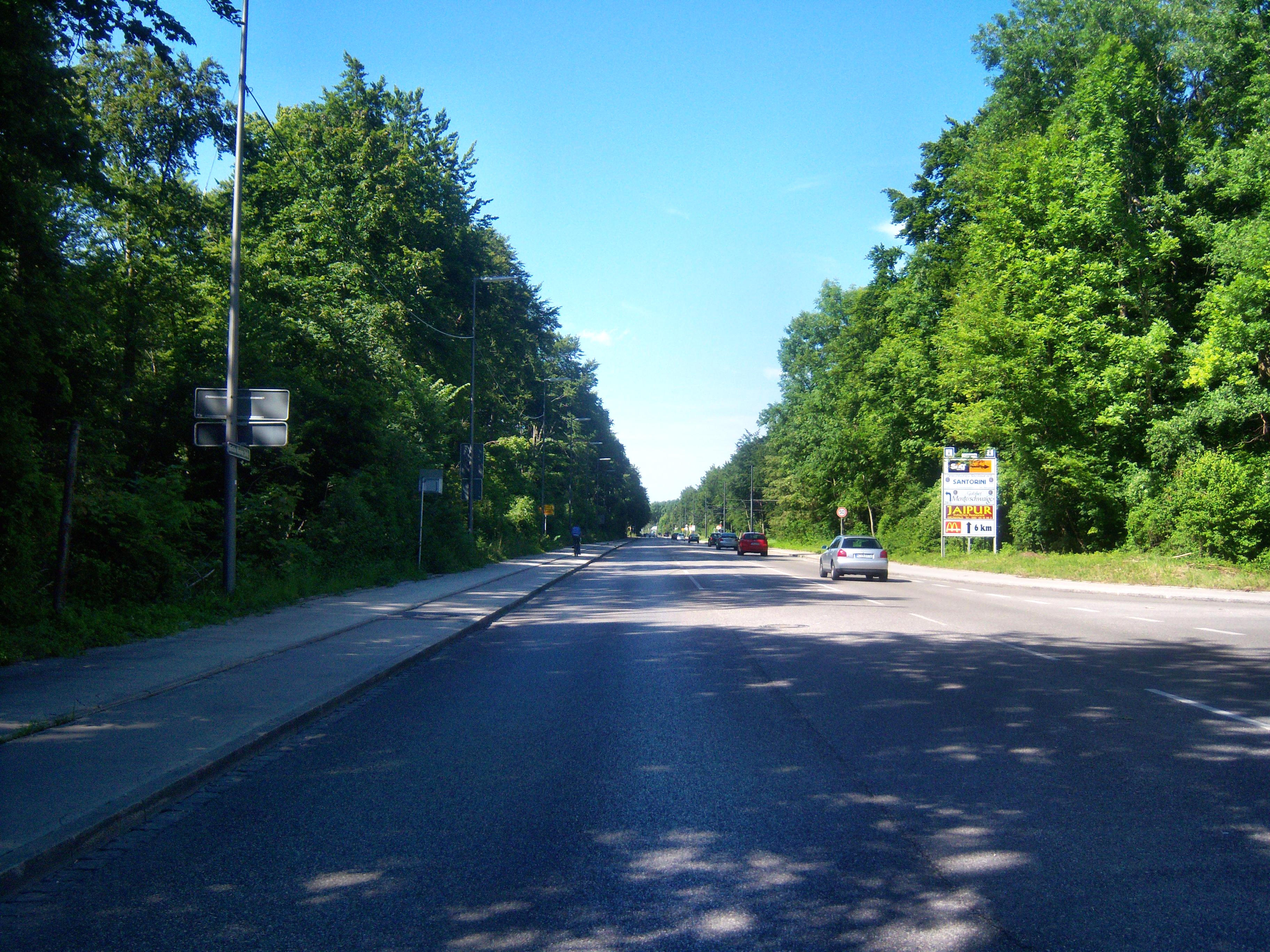 Ausfahrt von Geiselgasteig nach München (Deutschland) über die ST 2072